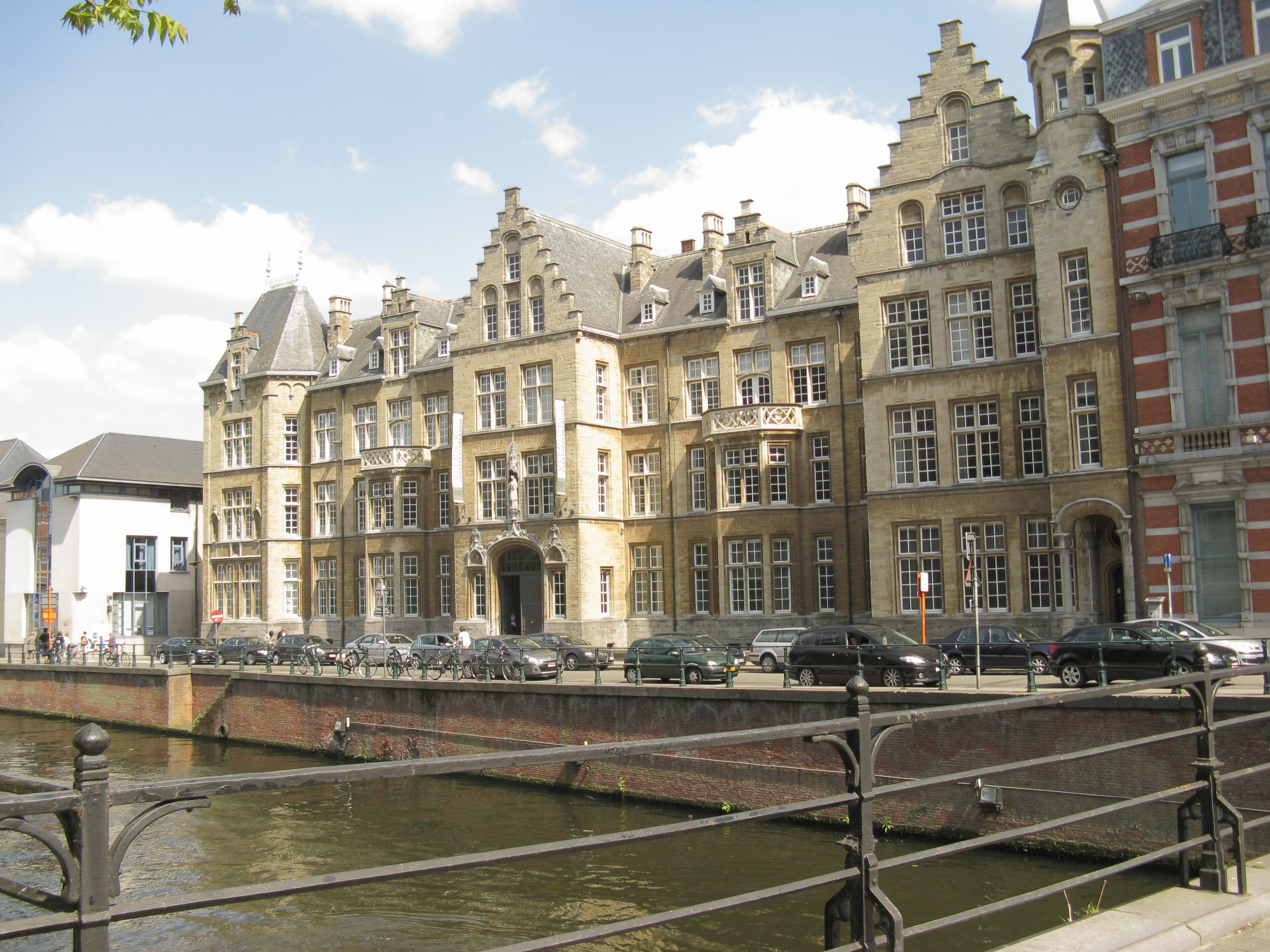 Voormalig seminariegebouw, Reep, Gent